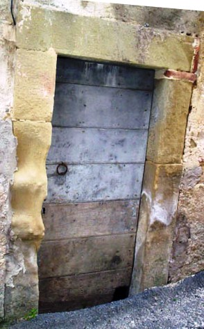 Gattarola in un fondaco A cat door in a fondaco (a depot at the ground floor, on the street)